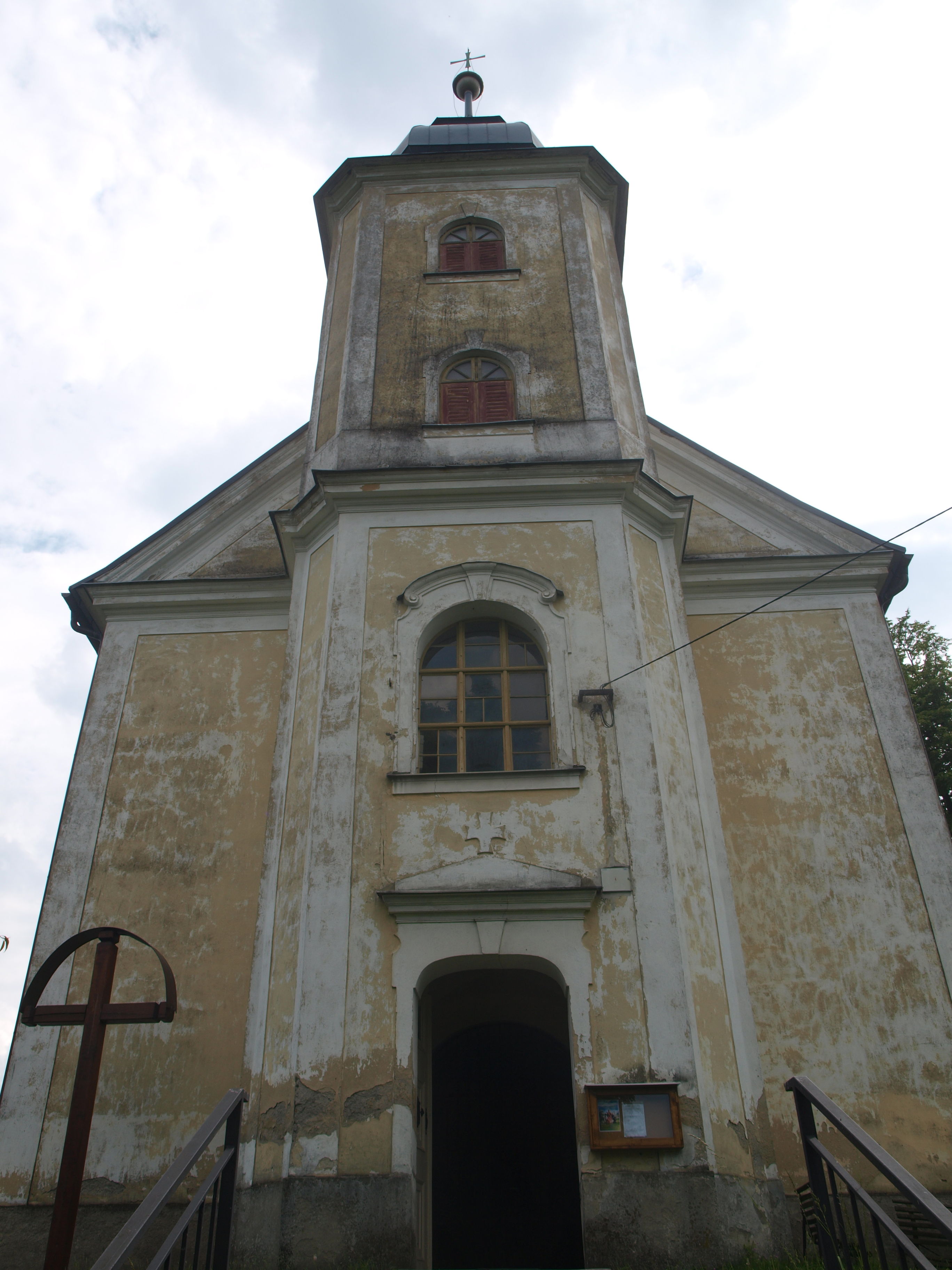 Kostel Neposkvrněného Početí Panny Marie v Dolním Václavově